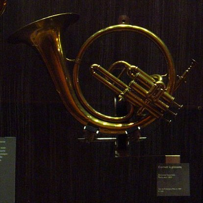 Cornet - Antoine Courtois, Paris, 18?? - Paris, musée de la musique